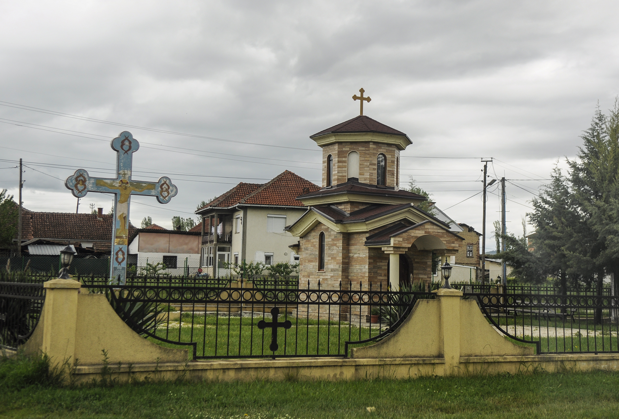 Црква „Св. Преполовение“